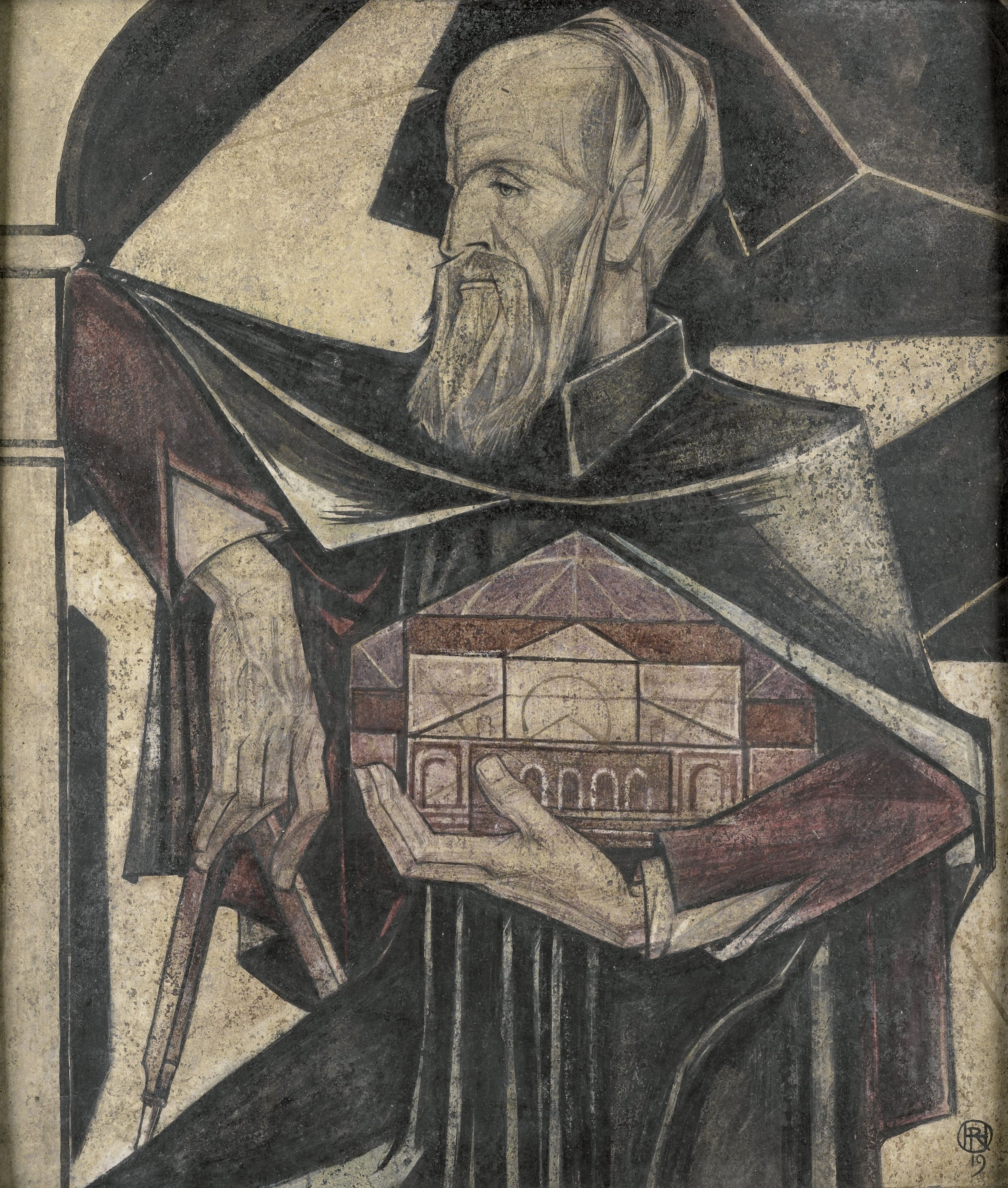 De bouwmeester. Een staande man, ten halven lijve, in de rechterhand een passer, in de linkerhand een schaalmodel van een gebouw. Soms geïnterpreteerd als Iram, de architect van de tempel van Salomo. Schets voor het schilderij in het Gemeentemuseum van Den Haag.